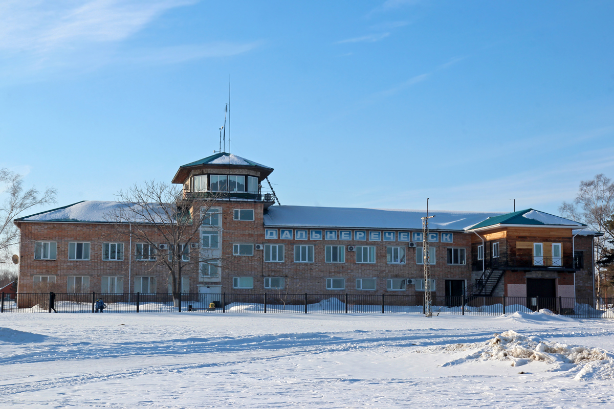 Аэродром Дальнереченска